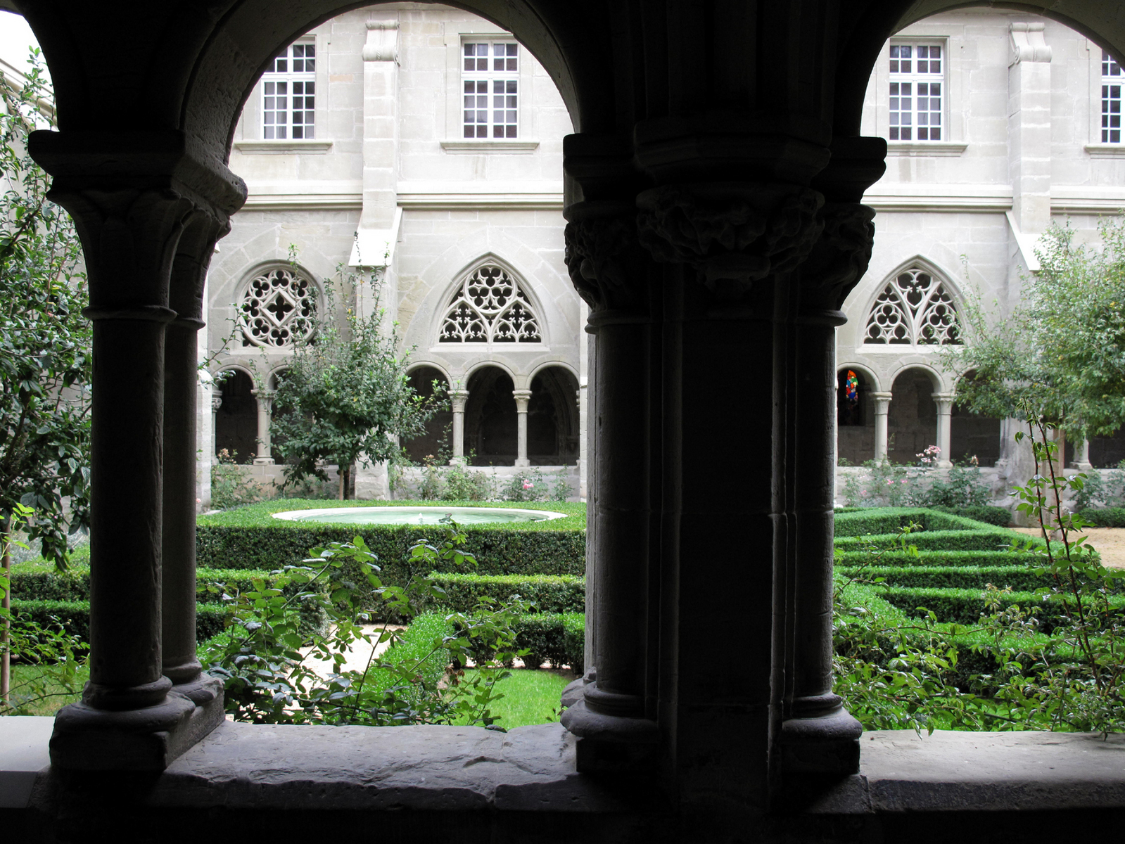 Hauterive, abbaye cistercienne, cloître